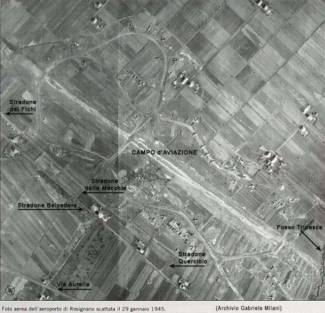 come era strutturato l'aeroporto